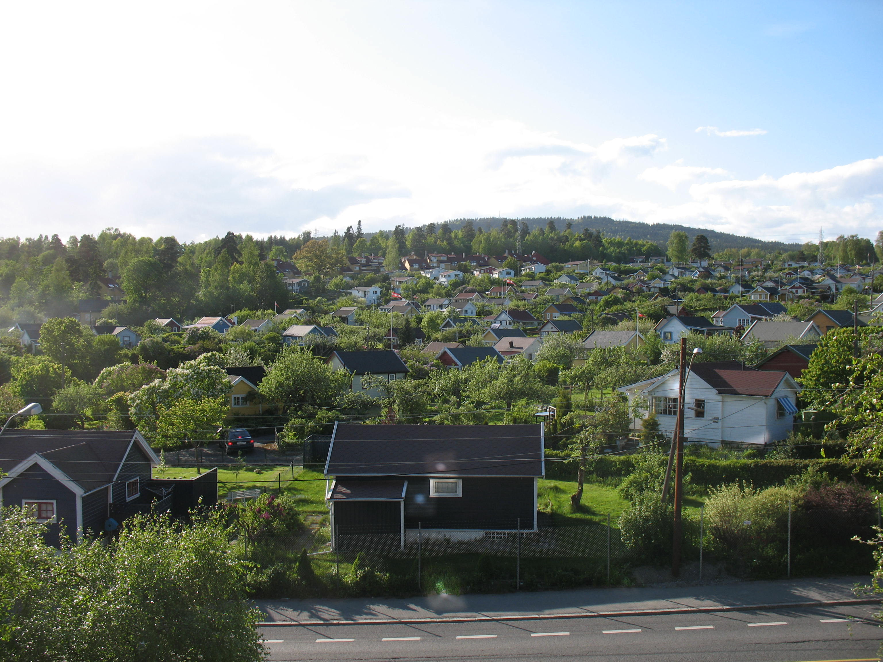 Solvang kolonihave på Sogn i Oslo. Sett fra Sogn studentby, rett over Sognsveien